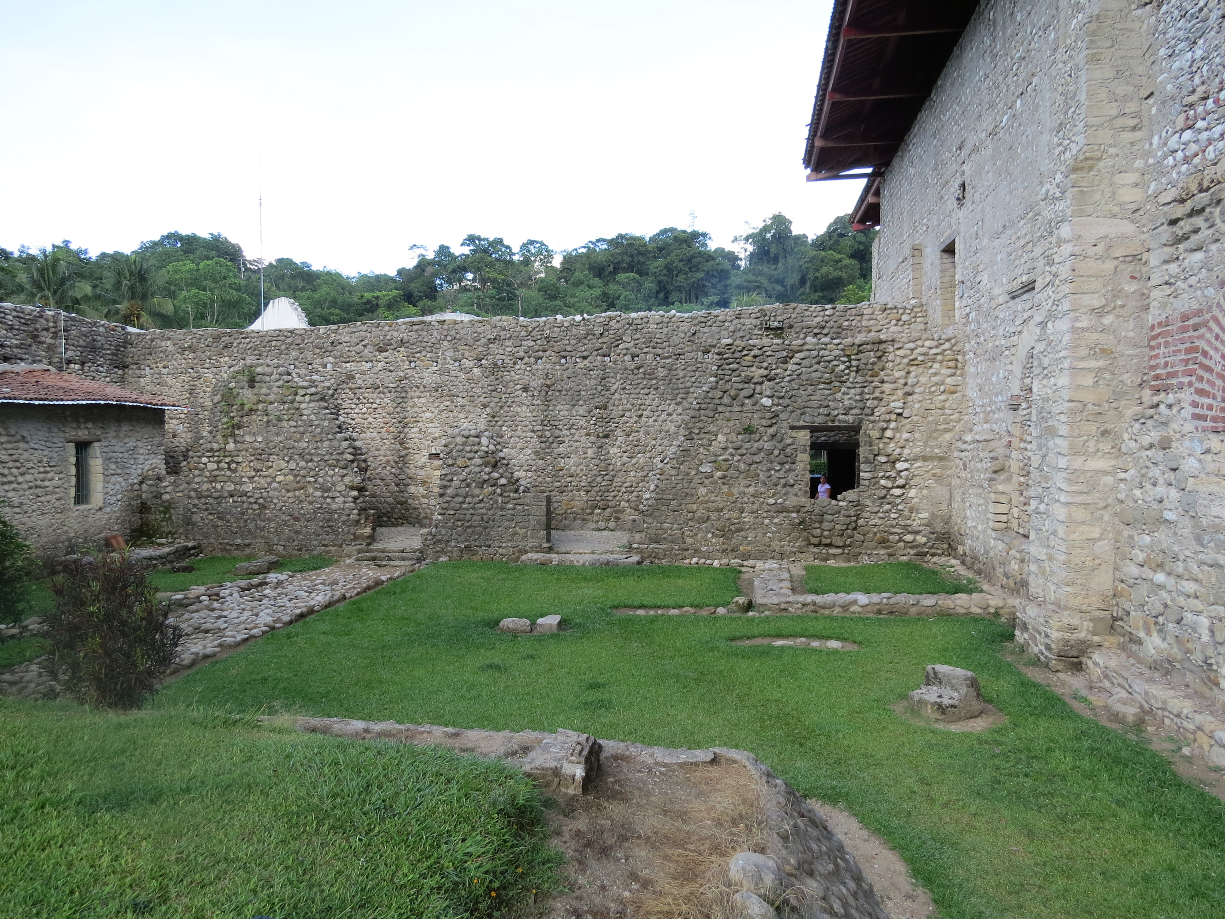 Fue dinamitada en 1926 por seguidores del exgobernador Tomás Garrido Canabal. Oxolotán, municipio de Tacotalpa, Tabasco, México.